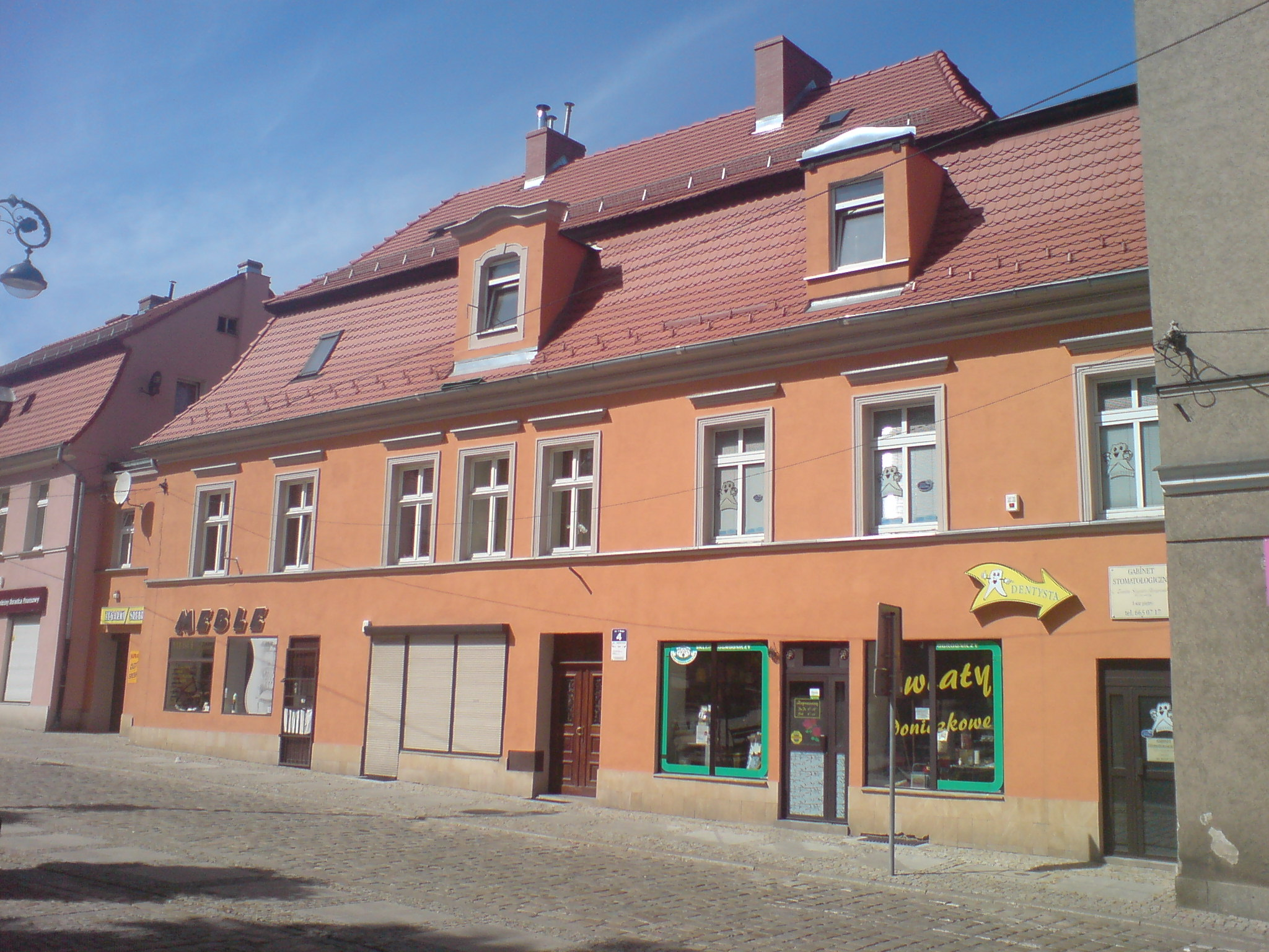 Wałbrzych, ul. 1-go Maja 4 - budynek mieszkalny (zabytek nr 1516/WŁ z 26.08.1996)